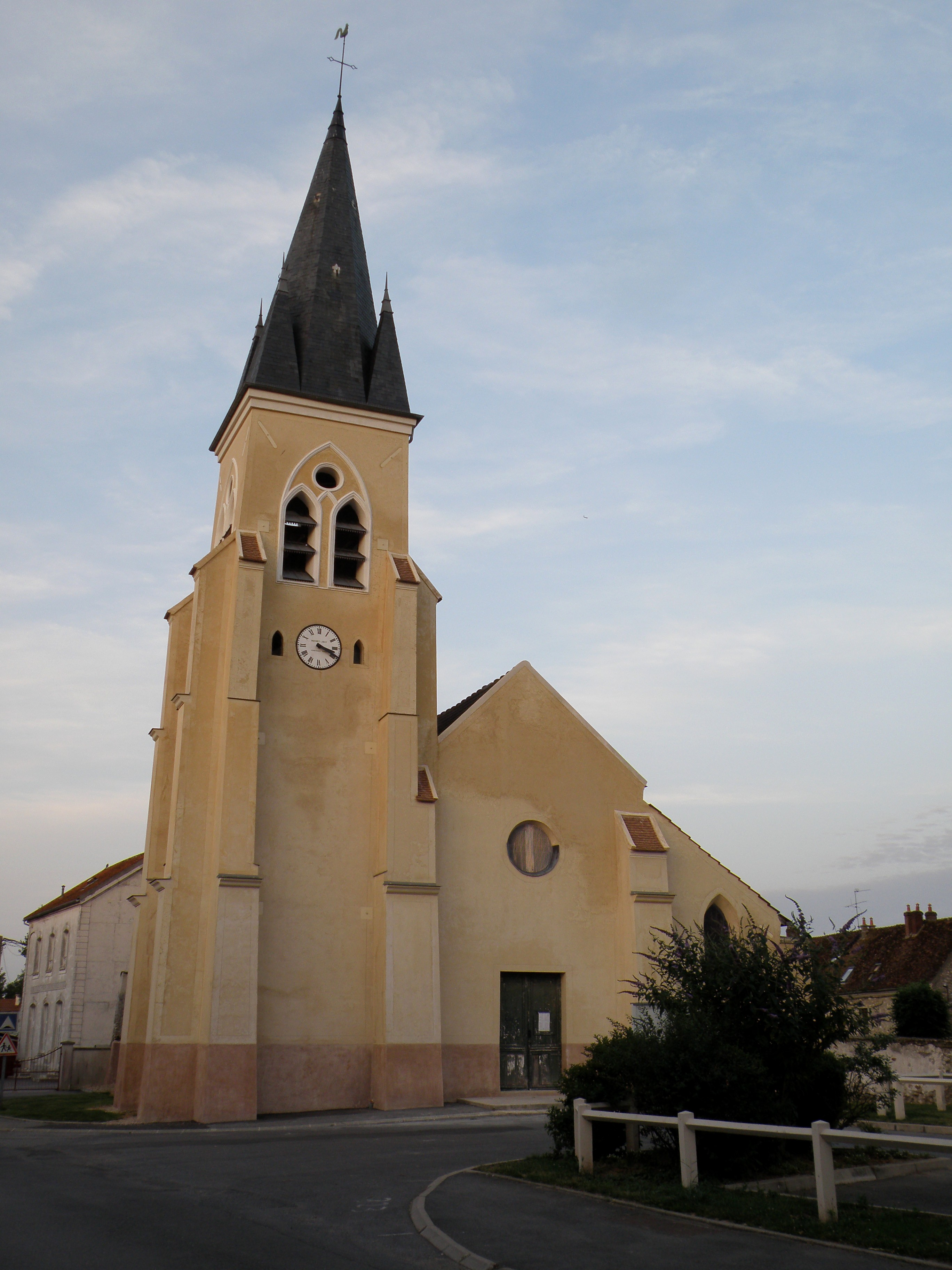 Eglise d'iverny en Juillet 2010